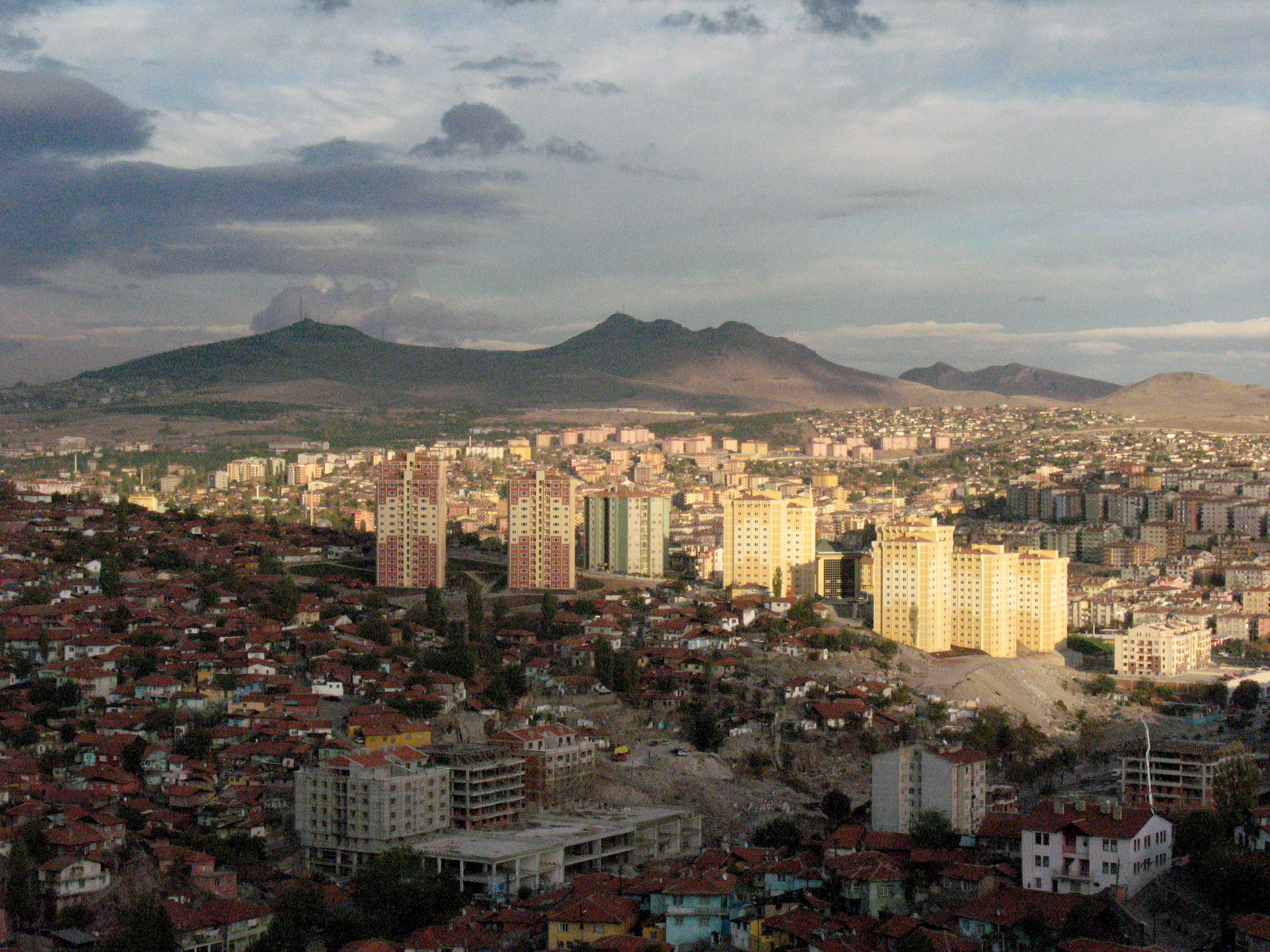 „Анкара, изглед от "Hisar"“